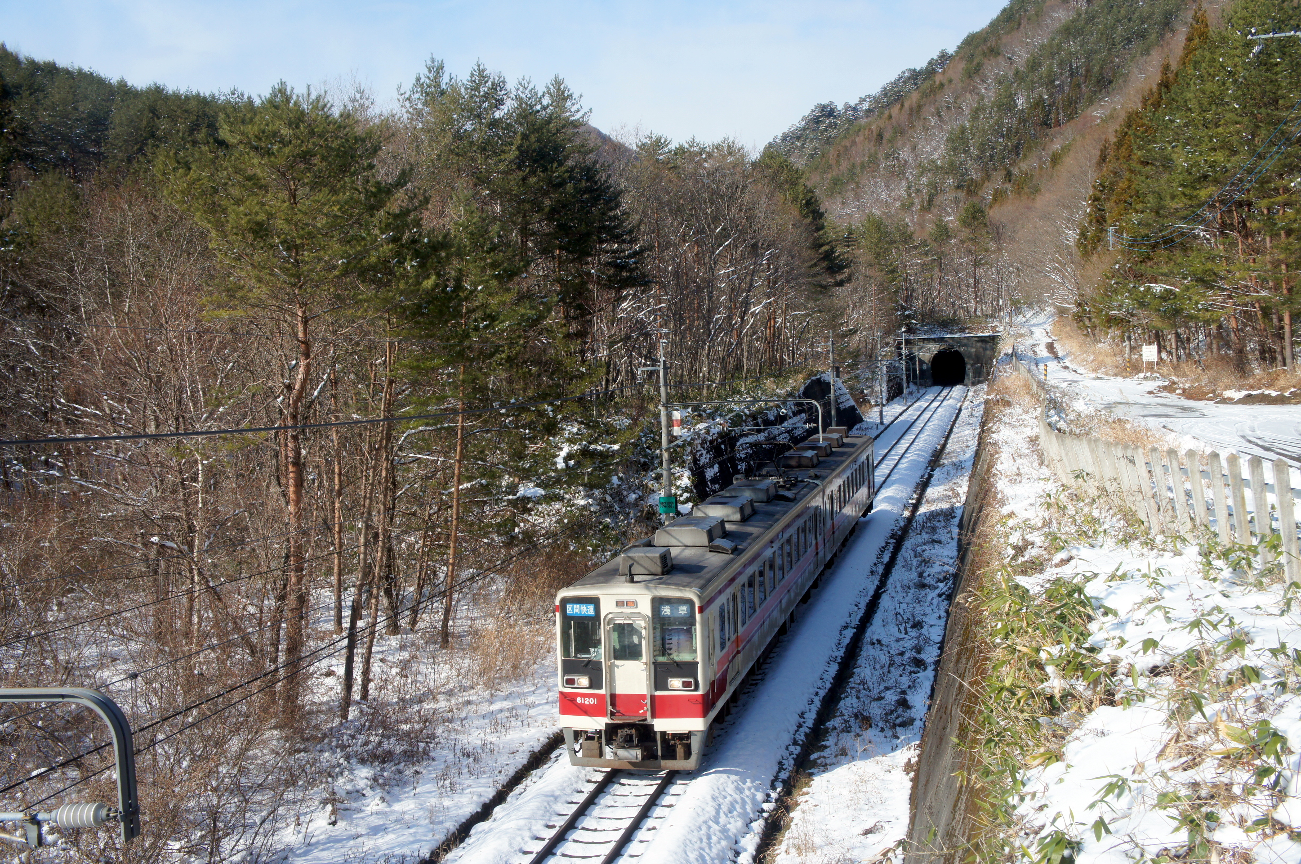 野岩鉄道会津鬼怒川線の男鹿高原駅付近を走る会津鉄道6050系電車。